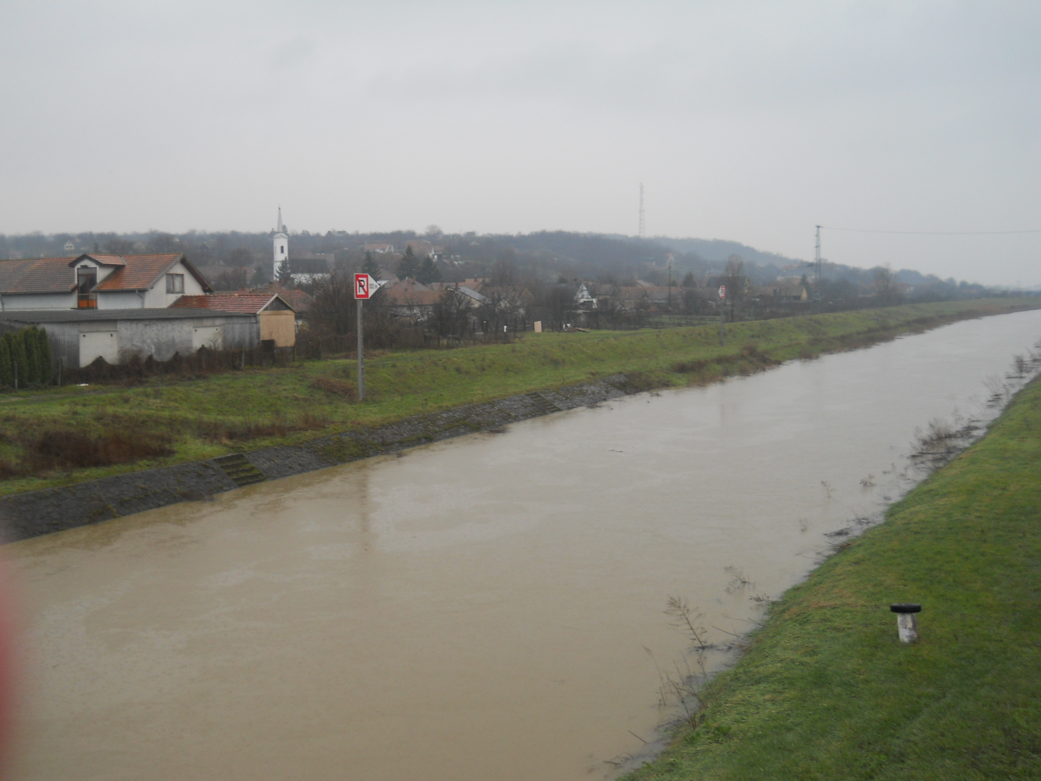 Simontornya - Sió-folyó